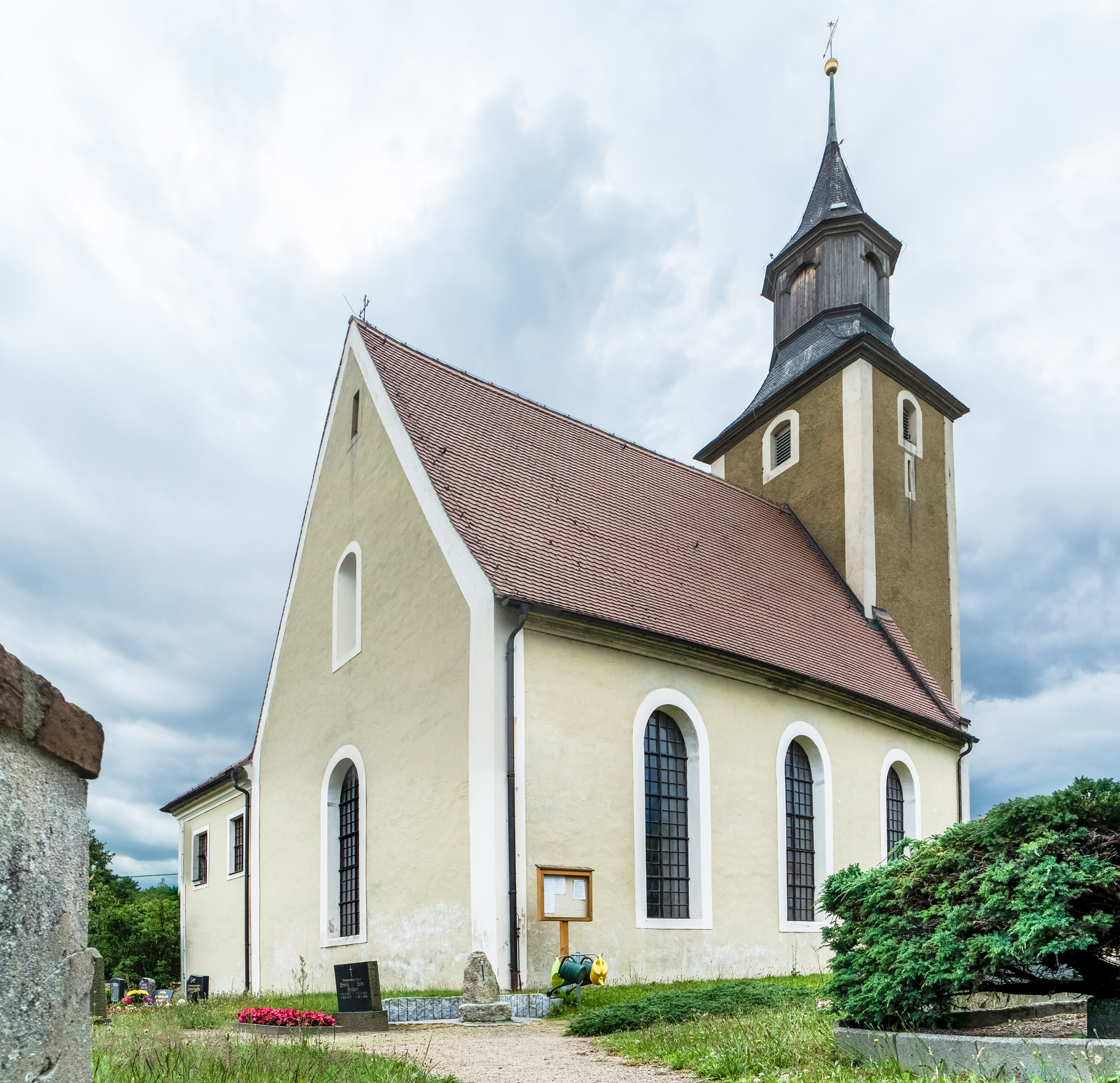 Kirche in Kollm (Quitzdorf am See)